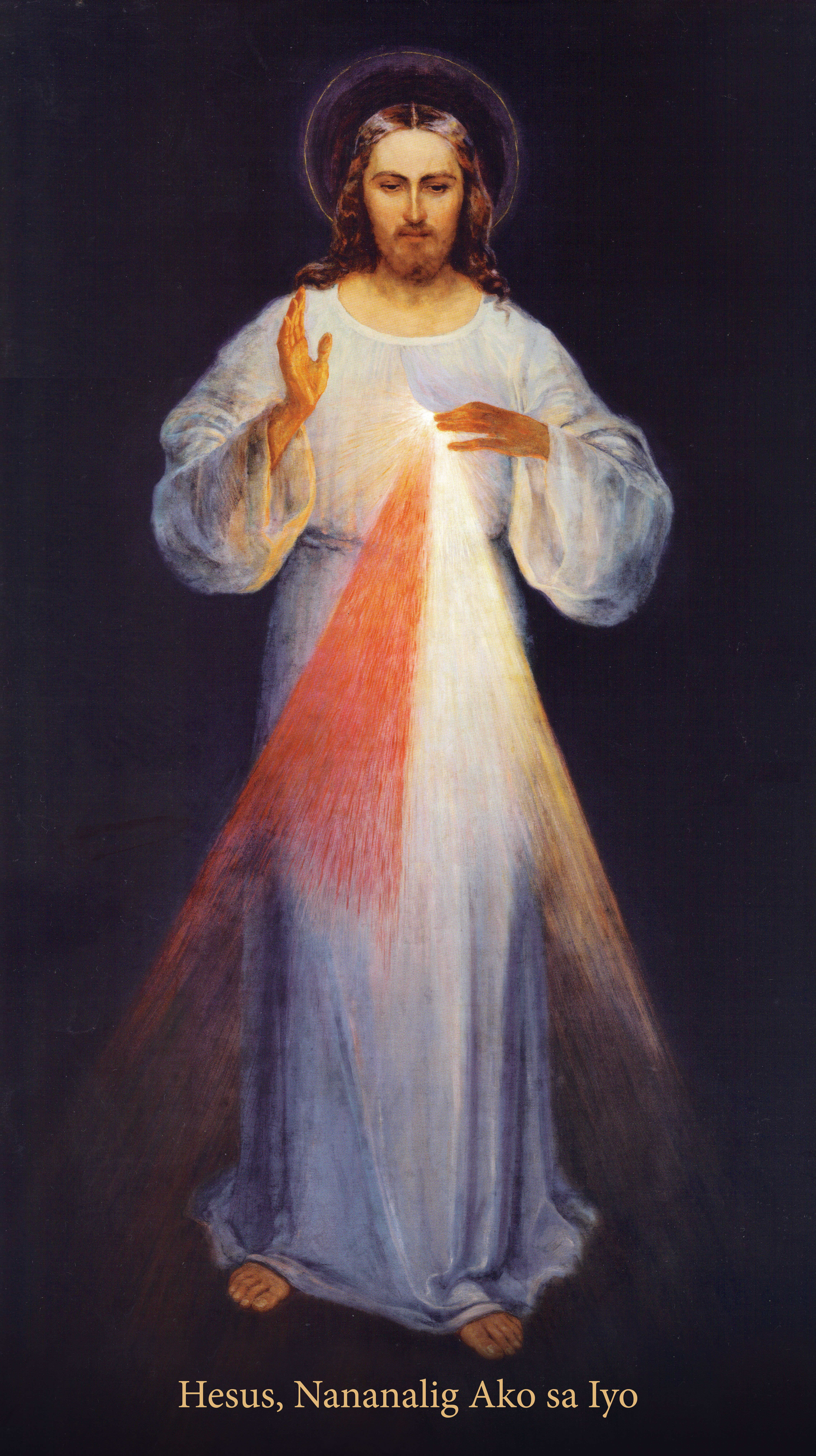 "Hesus, Nananalig Ako sa Iyo", Eugeniusz Kazimirowski, 1934